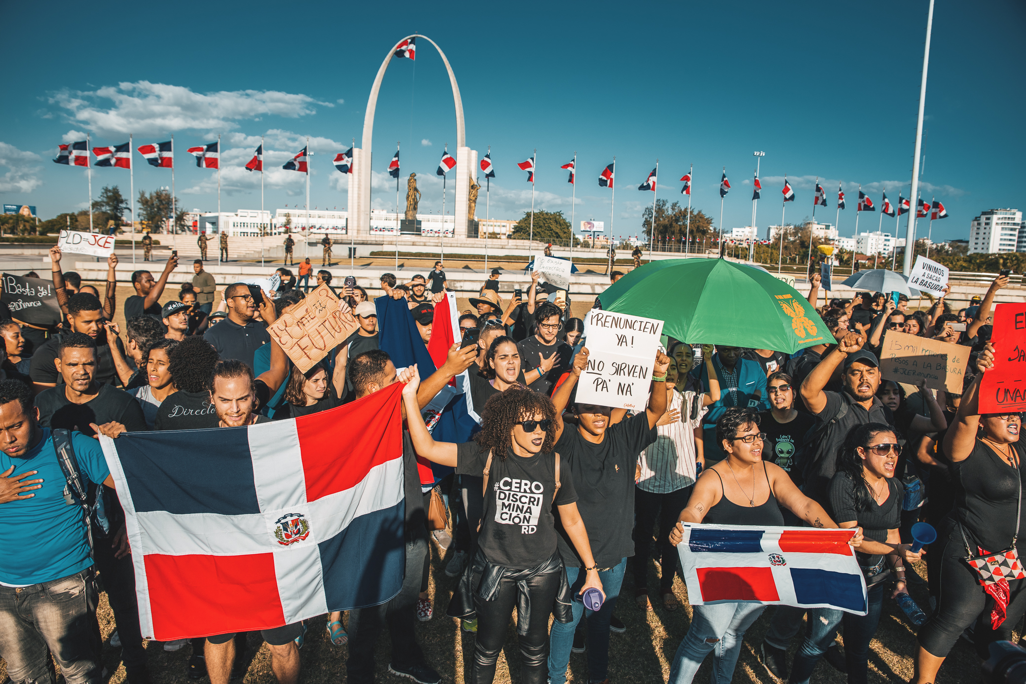 Protestas dominicanas de la Generación del 20